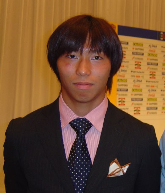 Hisato Sato, in 2004